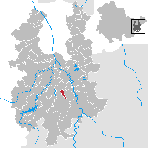 Kühdorf in Thuringia - District Greiz